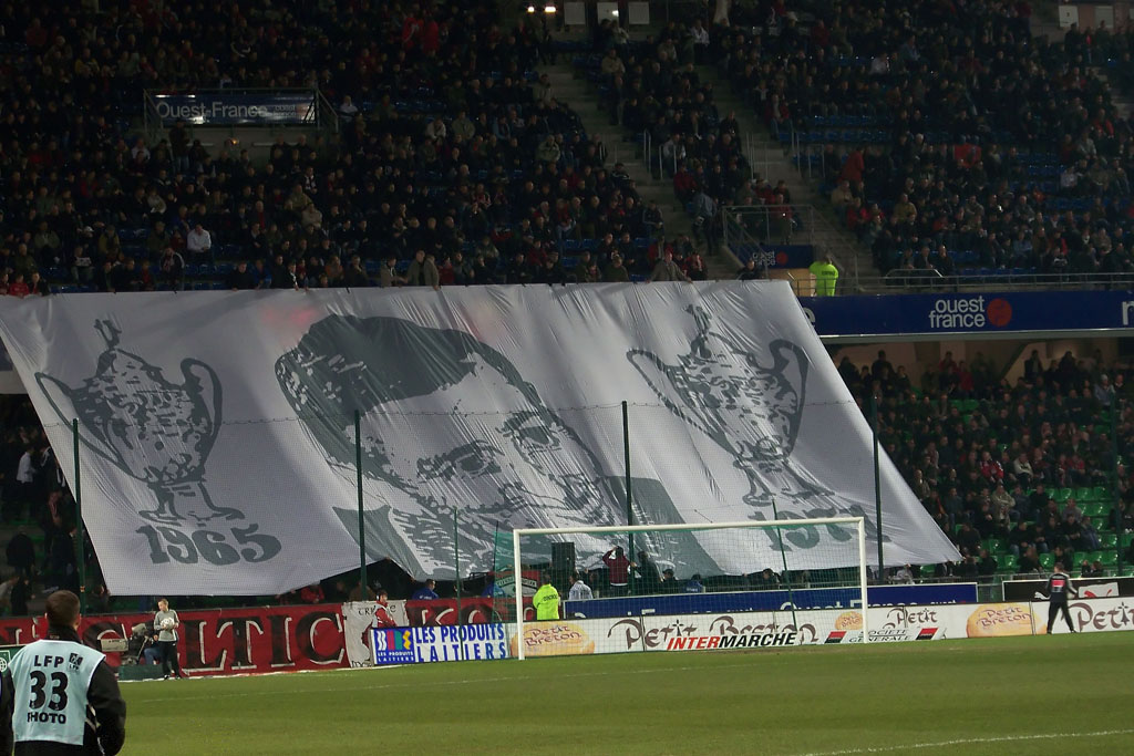 Match de Foot Rennes - Lorient, 23 Février 2008, Ligue 1 Saison 2007-2008